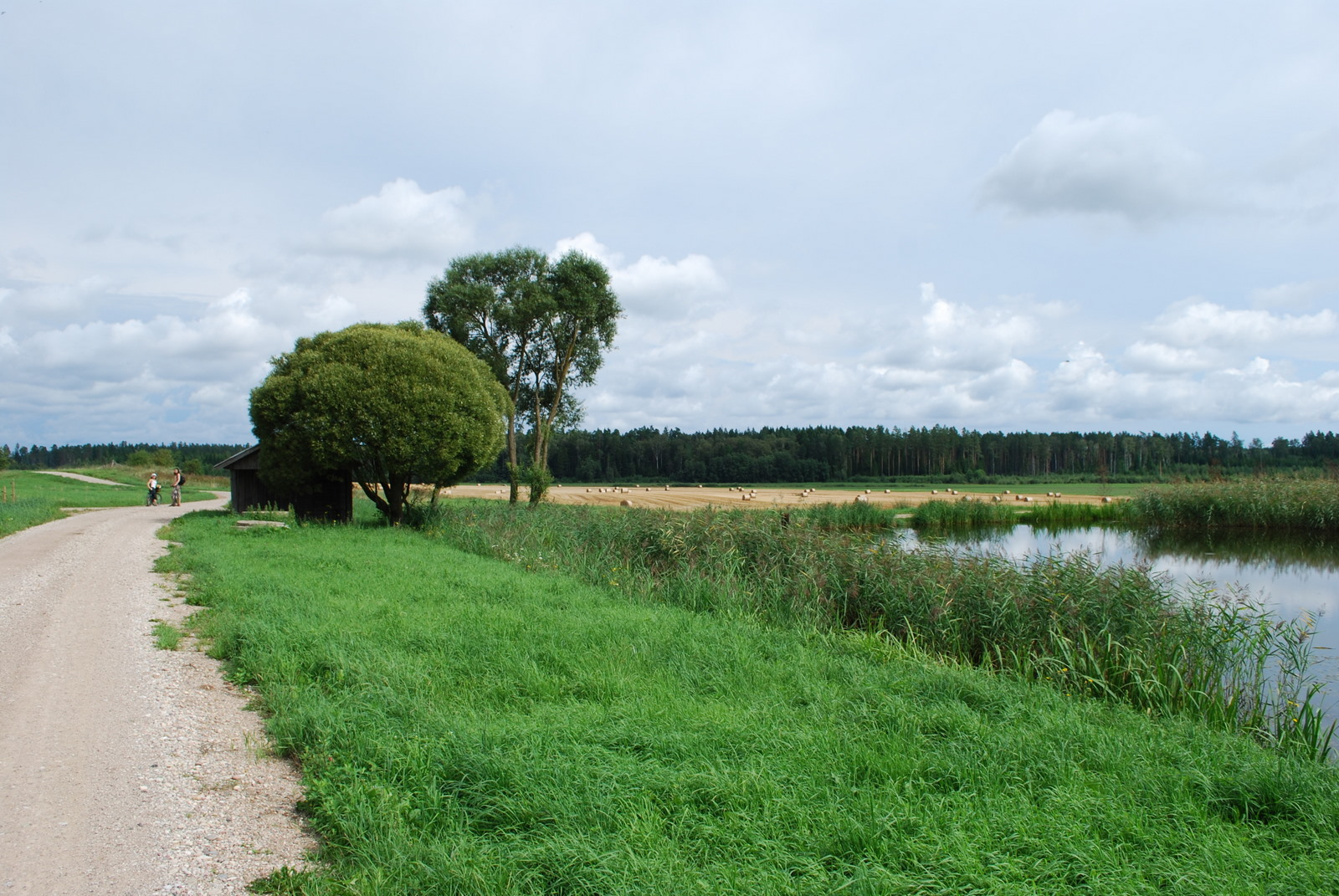 Vilksalas apkārtne